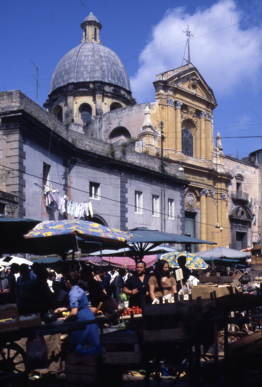 Napoli. Piazze. Servizio fotografico : Napoli, 1978 / Paolo Monti. - Foglio: 1, Fotogrammi complessivi: 1/20 : Diapositiva, sviluppo cromogeno/ pellicola ; 35 mm. - ((Le diapositive nn. 01-14 e 16-20 costituiscono altre serie. - Sullo chassis della diapositiva striscia adesiva in carta bianca con iscrizione inventariale? ("MO 289"). - Occasione: Reportage a colori sulle piazze italiane. - Fonte: Rubrica di Paolo Monti: Diapositive 24x36mm (1948-1982), presso Archivio Paolo Monti. Rubrica con elenco soggetti e numeri di inventario (da 1 a 1000) corrispondenti ai fogli a tasche in pvc in cui sono contenute le diapositive. - Fonte: Fattura di Paolo Monti: IV. Commesse/ Fattura n. 11/ Reportage fotografico diapositive a colori su piazze italiane (1978/06/30), presso Archivio Paolo Monti. Fotografie eseguite sulle seguenti piazze: Verona, Vicenza, Padova, Palermo, Cefalù, Carpri, Napoli e Nardò. Materiali e sviluppi: N. 18 rulli colore 6x6, n. 17 rulli colore 35mm, n. 18 sviluppi 6x6; n. 17 sviluppi 35mm